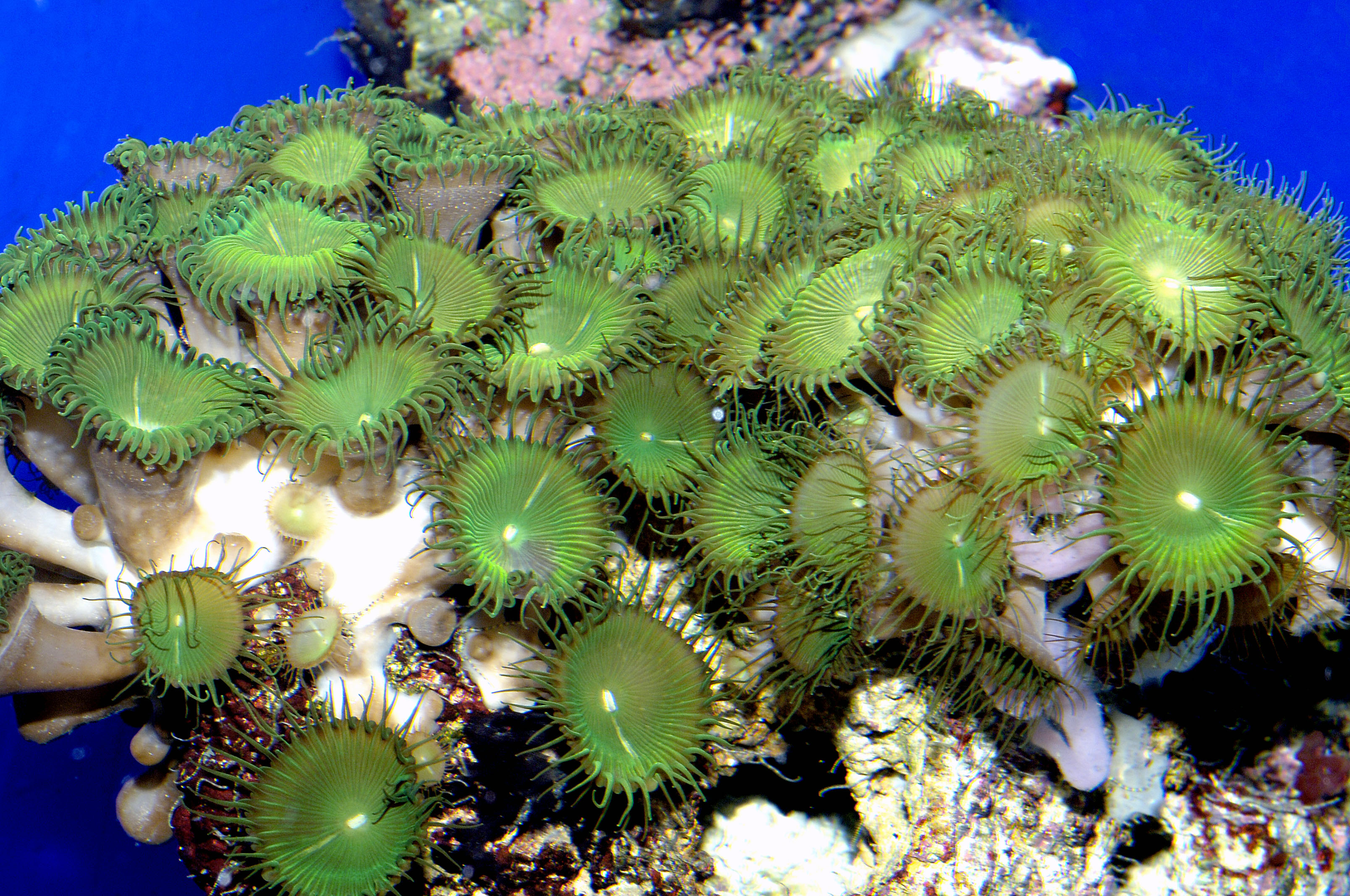 Anémones coloniales, Zoanthus sp.